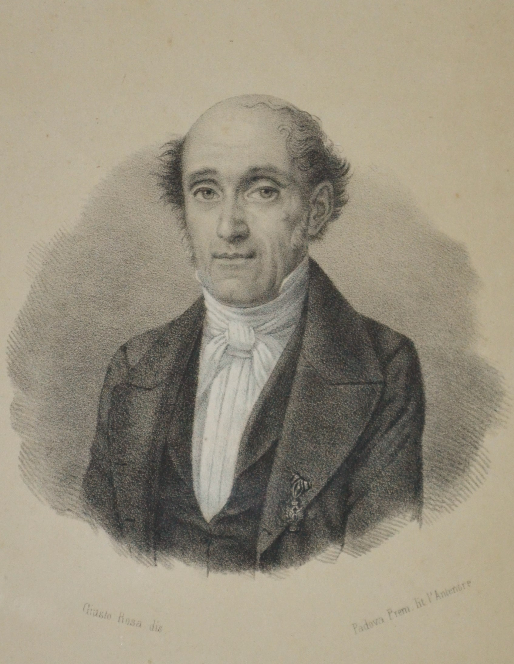 Il giurista Alessandro Racchetti, da una stampa d'epoca